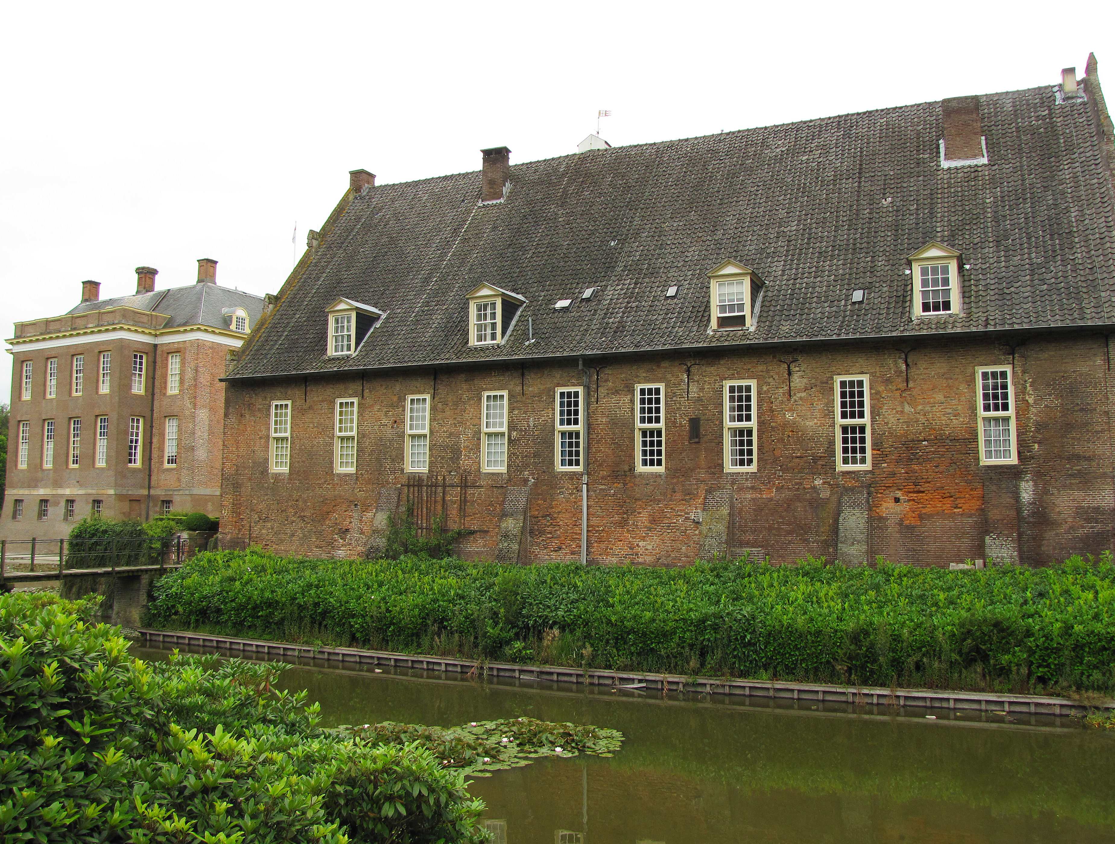 Oostelijk bouwhuis met kasteel op achtergrond.